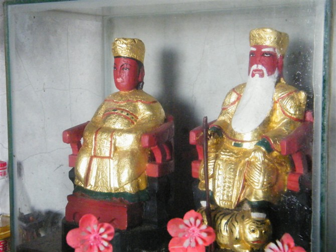 汕头达濠东湖岭东山土地庙伯公、伯姆像